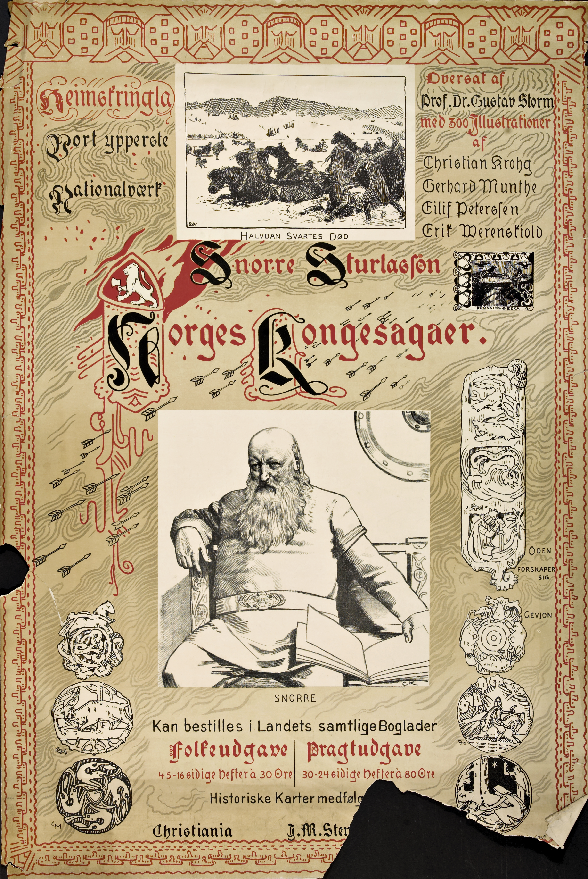 Beskrivelse / Description: Plakat / Poster (Reklameplakater for bøker/book posters) Kreditering / Credit: Gerhard Munthe (1849-1929) [Kilde: J. Veiteberg, doktoravhandling, 2000]. Avbildet på plakaten: «Dronning Bera» av Gerhard Munthe, «Halvdan Svartes død» av Erik Werenskiold, Christian Krohg, selvportrett (Snorre). Utgiver / Publisher: J.M. Stenersen Trykkemetode / Printing method: Litografisk trykk, 95 x 64 cm Dato / Date: [1898] [Kilde: J. Veiteberg, doktoravhandling, 2000] Eier / Owner Institution: Nasjonalbiblioteket / National Library of Norway Lenke / Link: Bildesignatur / Image Number: no-nb_plktr_02018